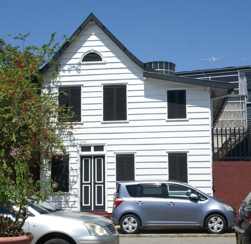 Onafhankelijkheidsplein 9, Paramaribo, Suriname